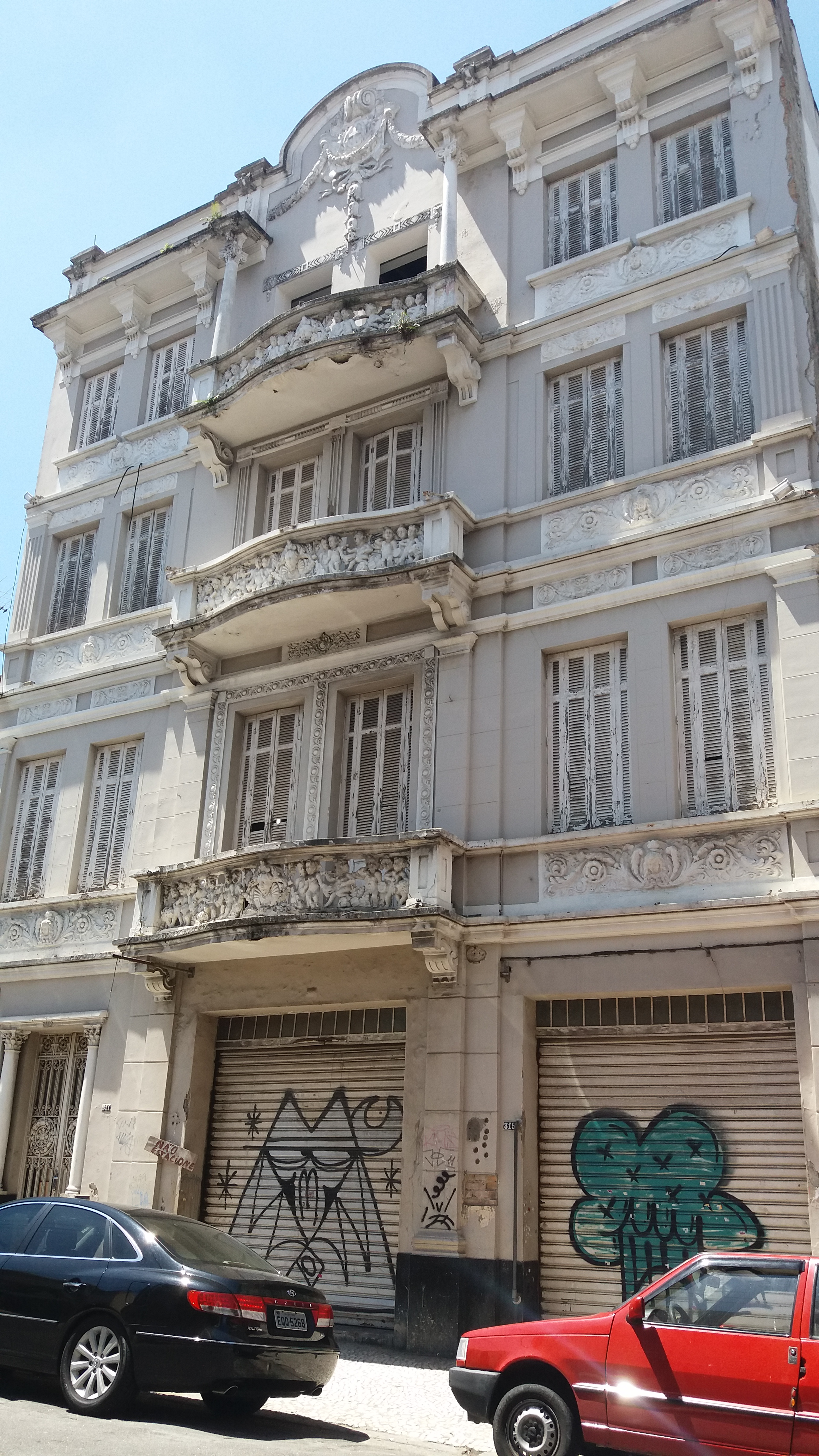 Fachada do antigo Teatro Brasileiro de Comédia, na rua Major Diogo, bairro da Bela Vista, região central de São Paulo